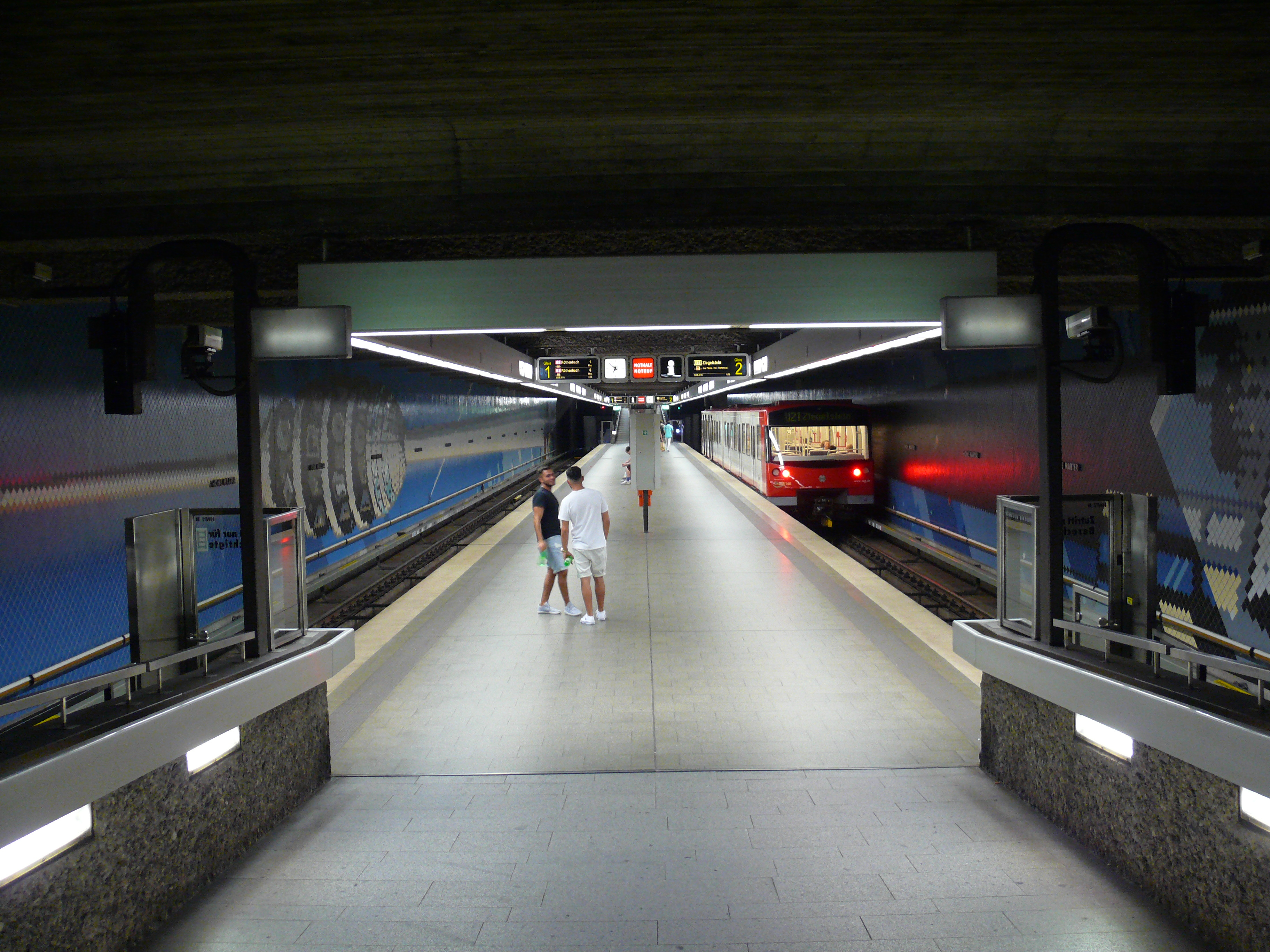 Blick auf die Bahnsteigebene am U-Bahnhof Hohe Marter in Nürnberg.